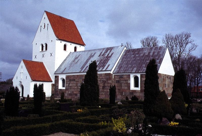 Durup Kirke, Skive Kommune